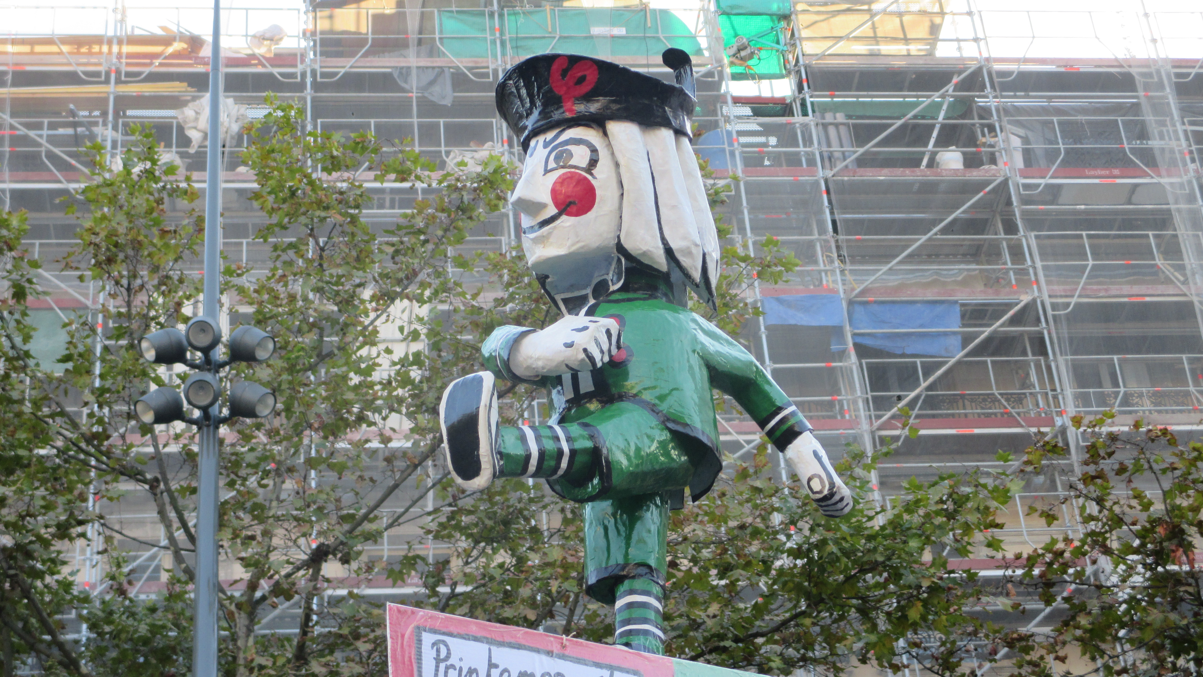 L'emblème de Picardie debout installé sur le camion à ballon du mouvement à République (Paris, France) lors de la marche du 23 septembre 2017 contre le Coup d'État social, organisée par La France insoumise.